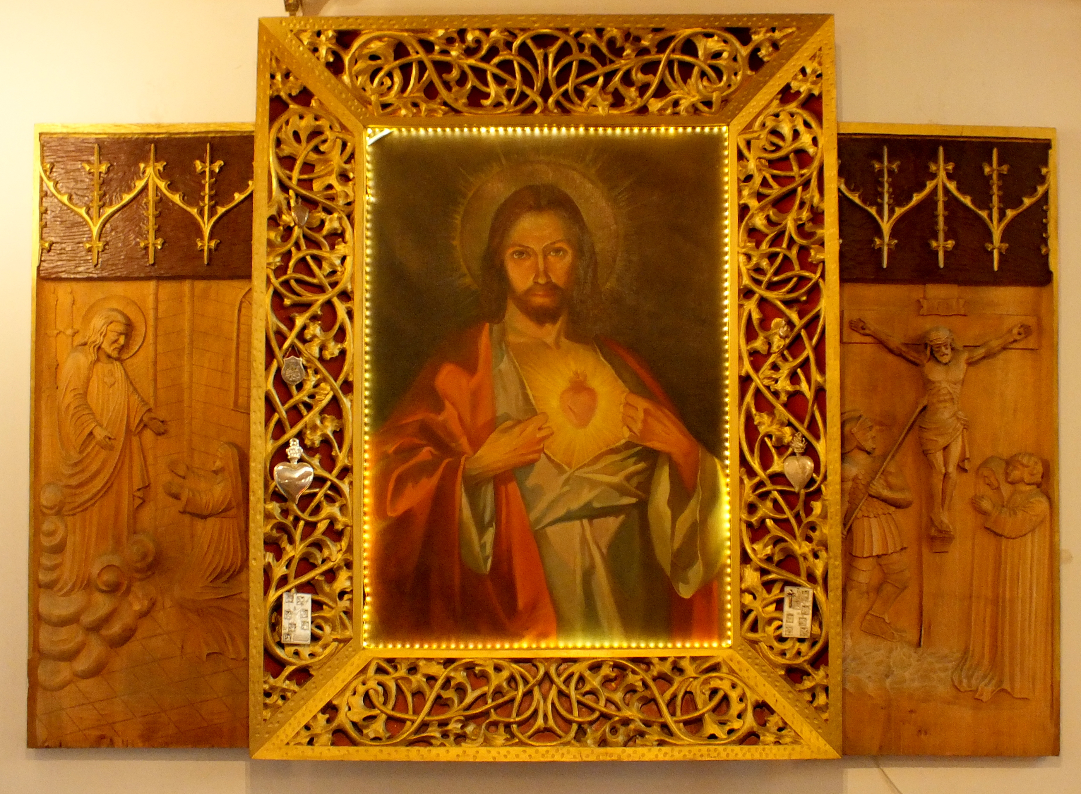 Kołobrzeg, kościół Niepokalanego Poczęcia Najświętszej Maryi Panny Wikidata has entry Q11745606 with data related to this item.